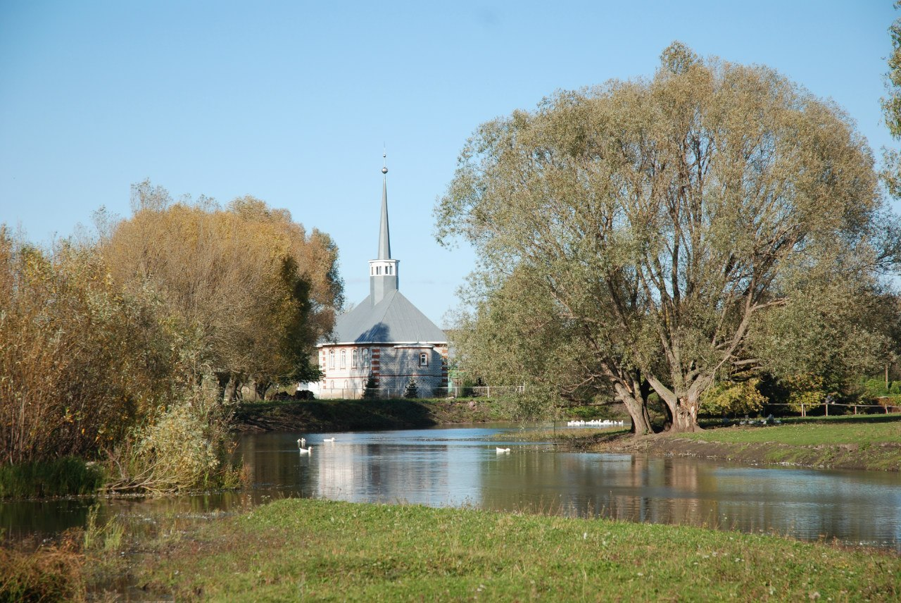 Сафаҗай 3 мечеть